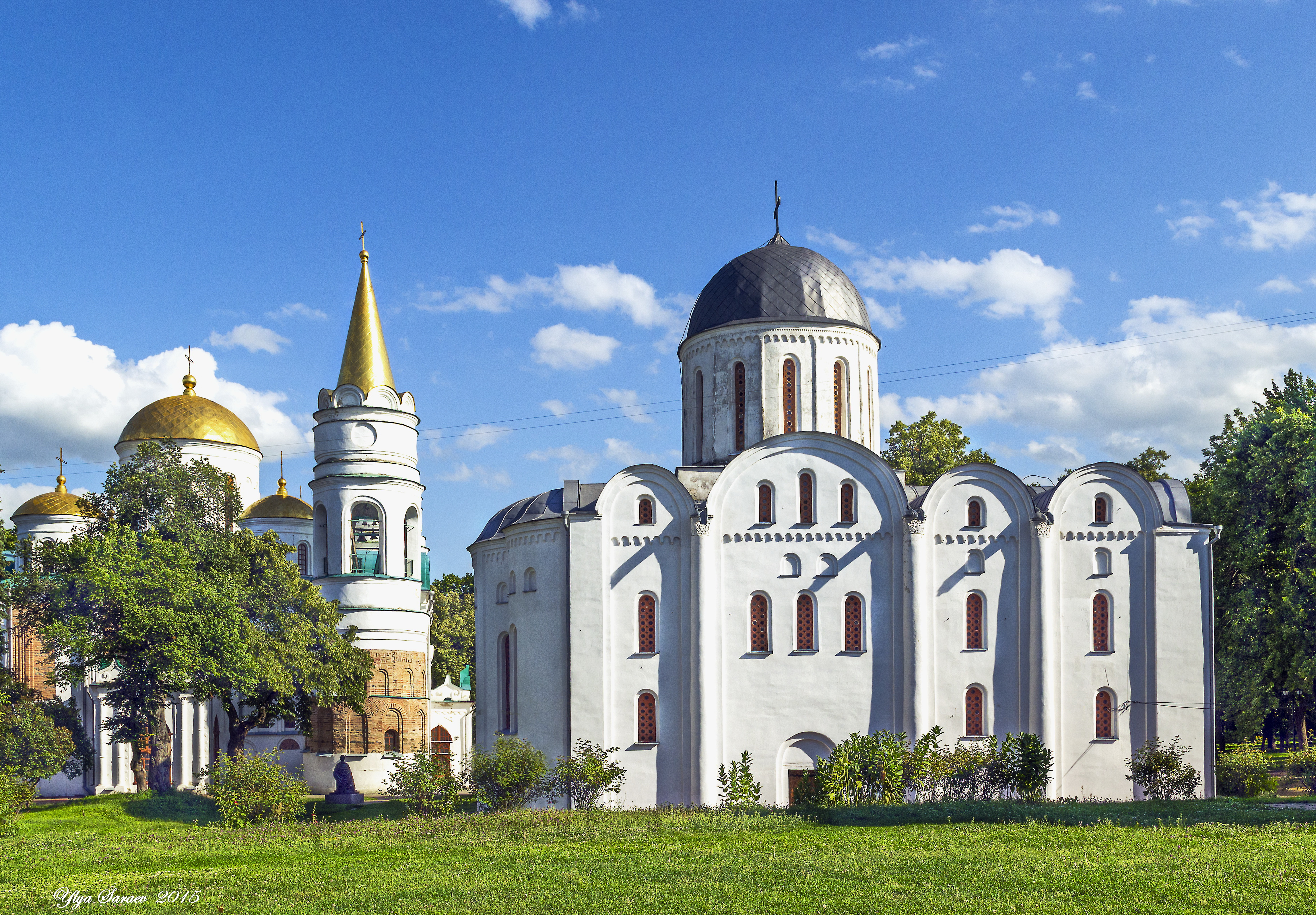 Борисоглібський і Спасо-Преображенський собор